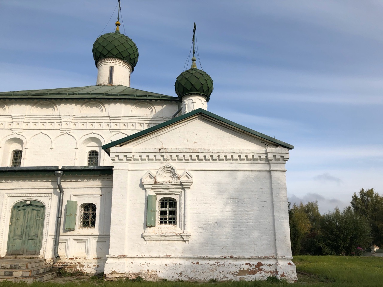 Северный фасад церкви Рождества Христова на Городище